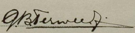 Frits Terwee signature.